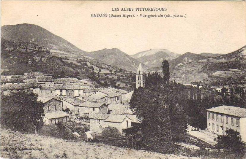 Bayons au début du siècle